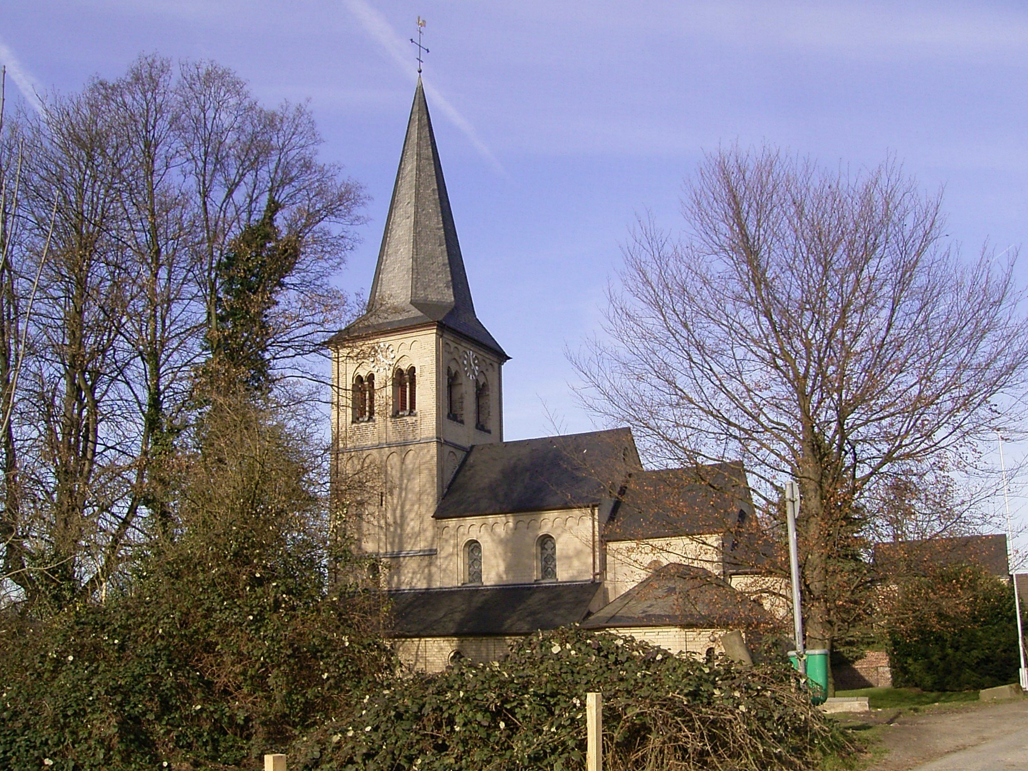 Sankt Nikolaus in Düsseldorf - Himmelsgeist